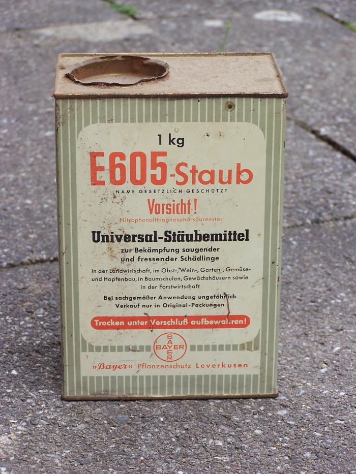 E605 1kg Dose aus ca 1960